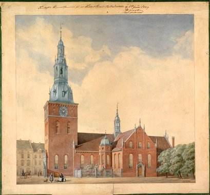 Akvarell av Vår Frelsers kirke/Oslo domkirke utført av Alexis de Chateauneuf i juni 1848 som illustrerer endringene han foreslo i eksteriøret og som stort sett ble gjennomført. Høyde: 61 cm Bredde: 65.7 cm. Akvarellen tilhører Nasjonalmuseet for kunst, arkitektur og design